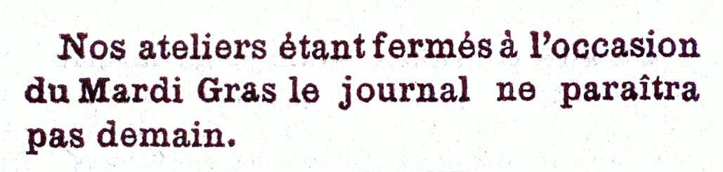 Annonce parue page 1, 1ère colonne du journal "Le Constitionnel".